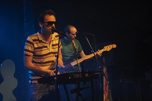 Konsert på Blå, Oslo 2009